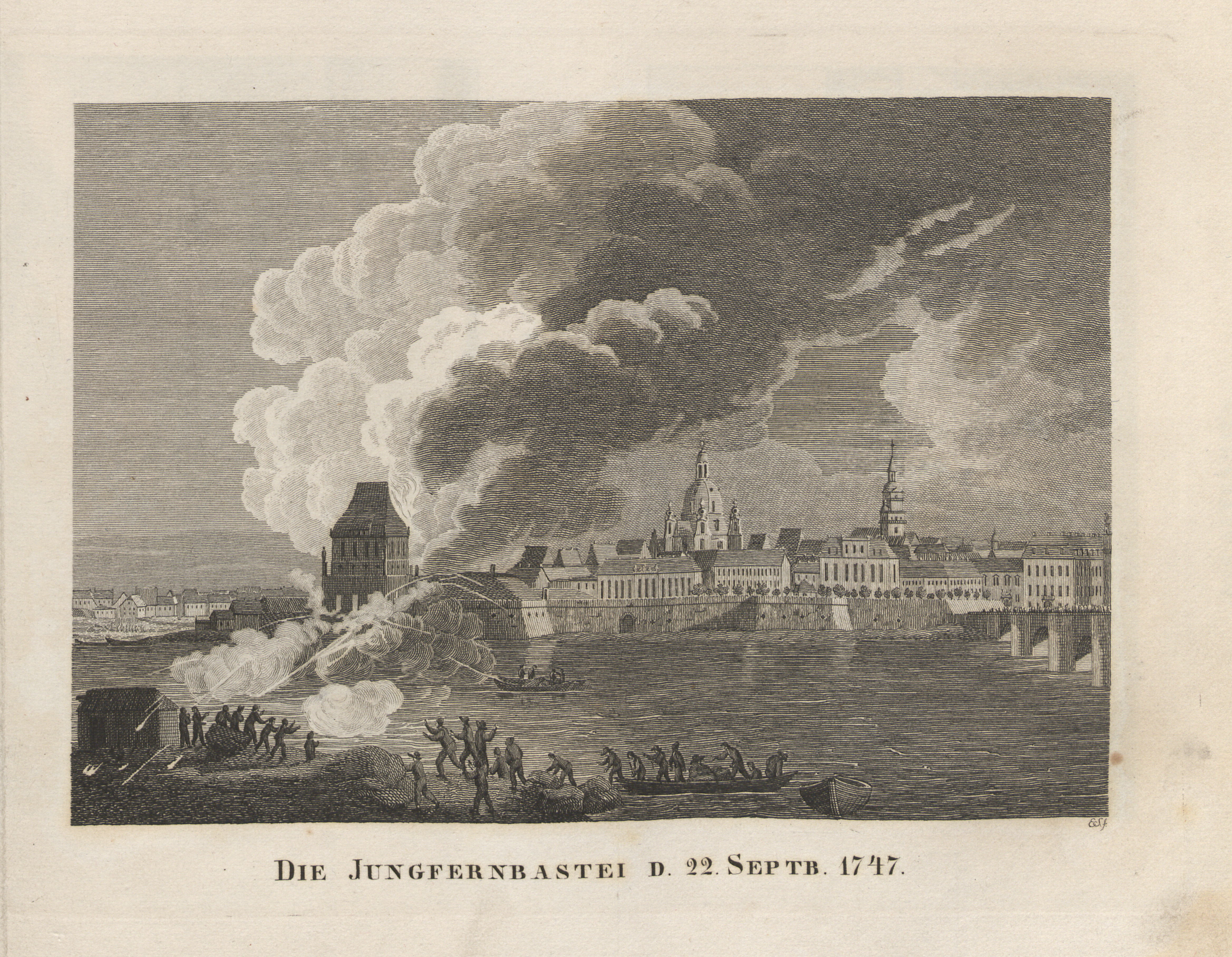 siehe Bildbeschreibung aus: Abbildungen von Dresdens alten und neuen Pracht-Gebäuden, Volks- und Hof-Festen. Untertitel: Kupferheft zur Chronik der Kgl. Sächs. Residenz-Stadt Dresden und des Sammlers für Geschichte und Alterthum, Kunst und Natur im Elbthale. Grimmer, Dresden 1835